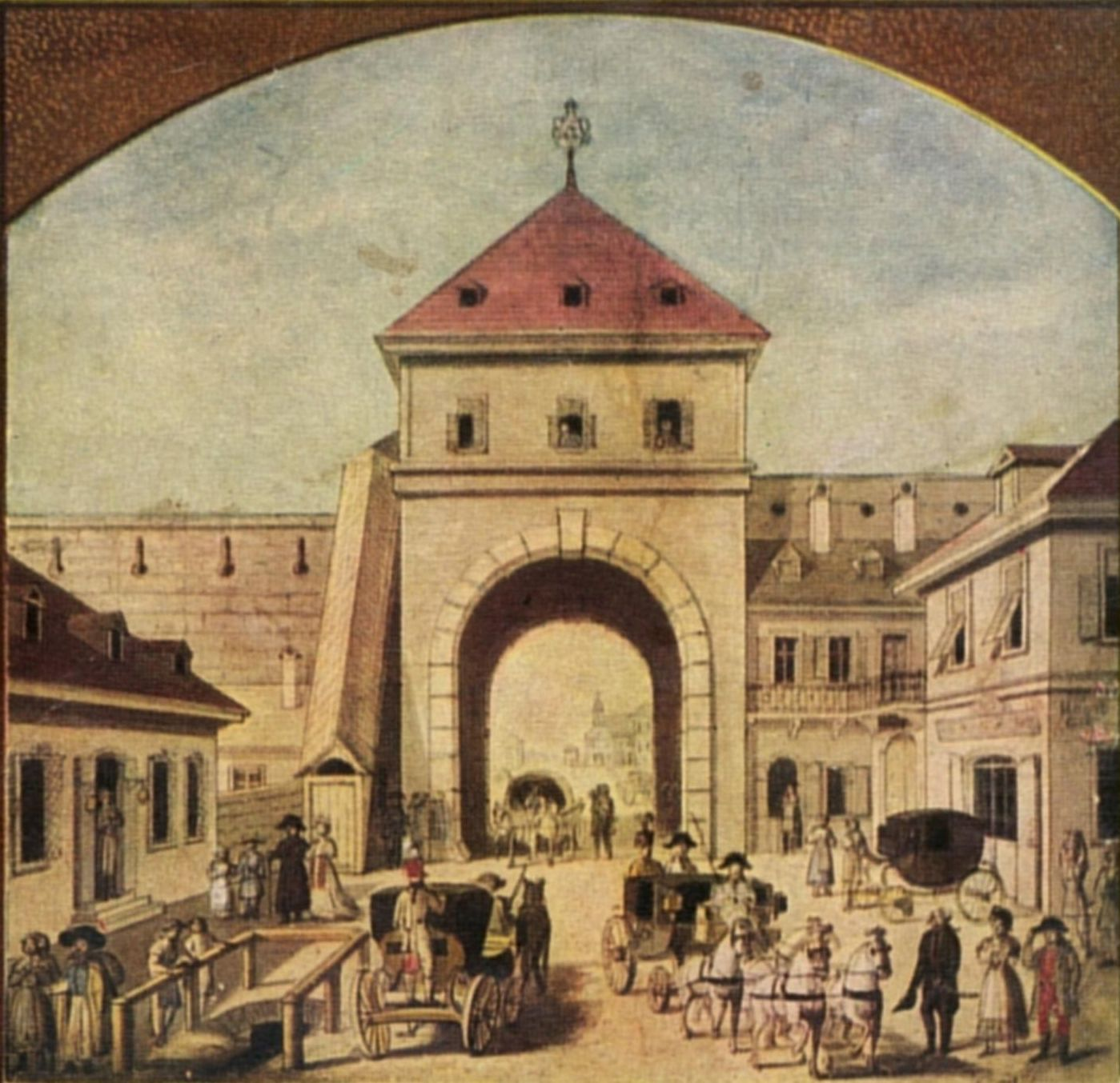 A hatvani kapu 1790 körül, a mai Kossuth Lajos (régen Hatvani) utca és a mai Rákóczi (régen Kerepesi) út torkolatánál